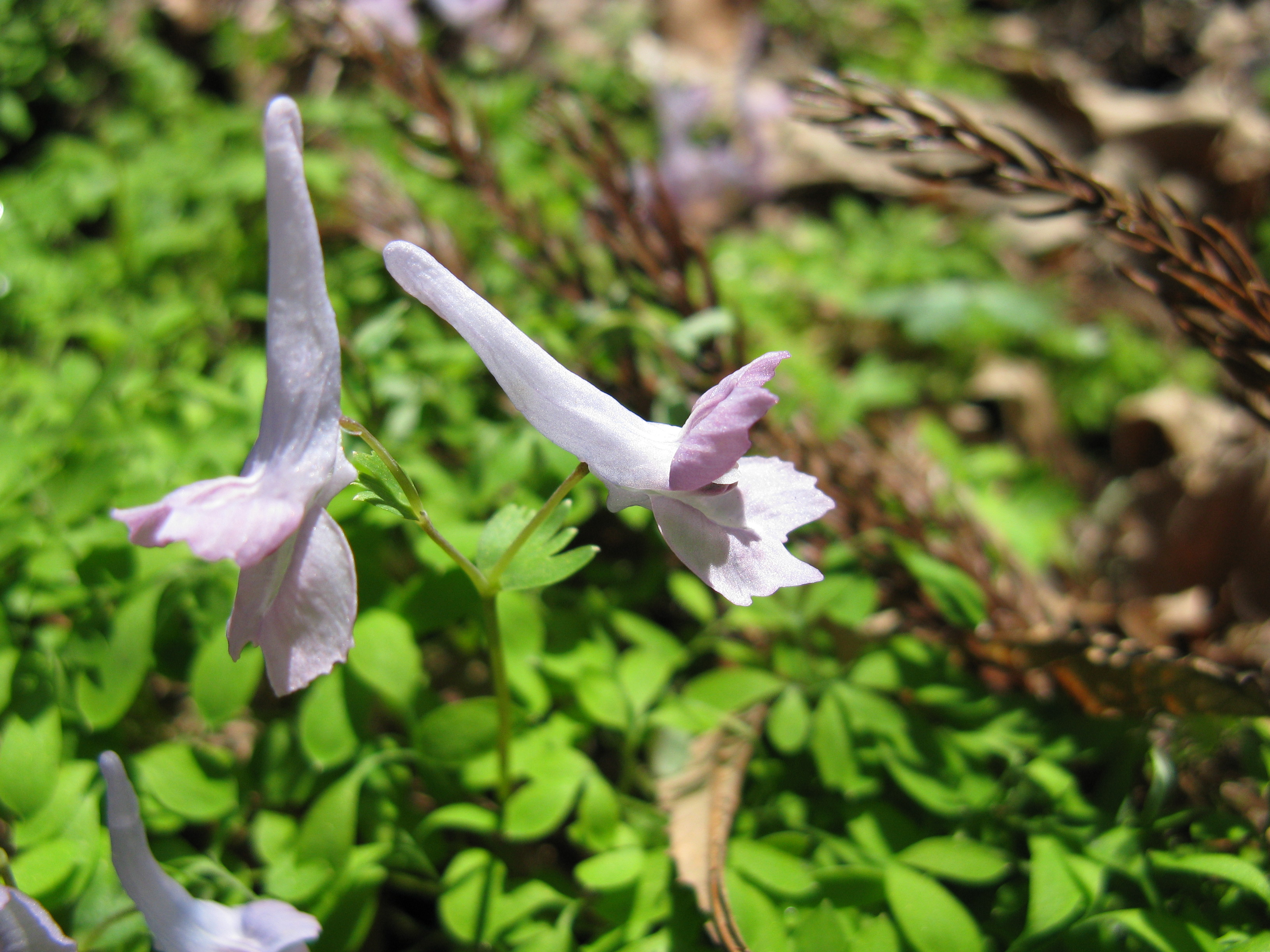 キンキエンゴサク Corydalis lineariloba var. papilligera Place:Kansai region,Japan